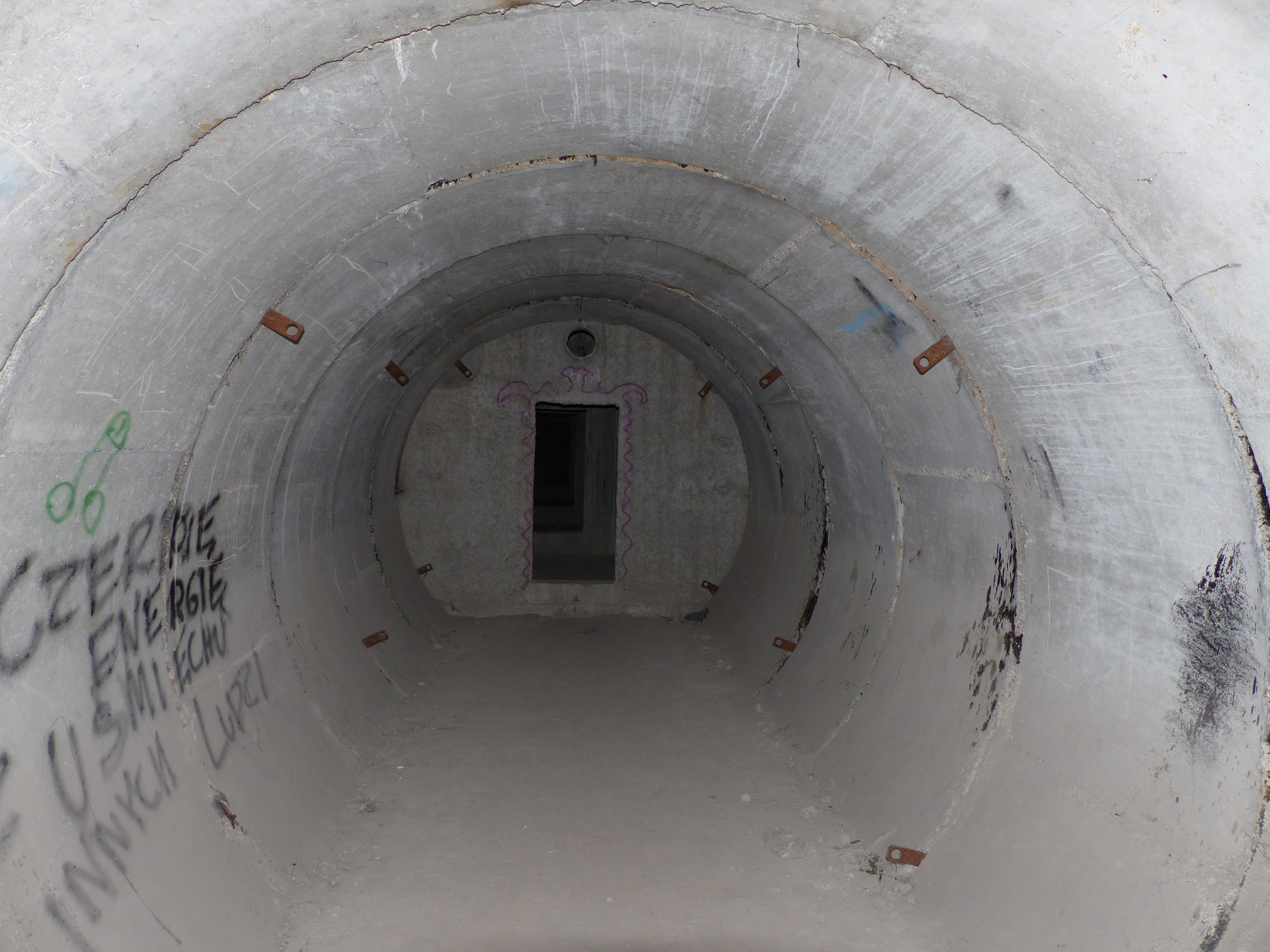 Underground barrack at -1 level